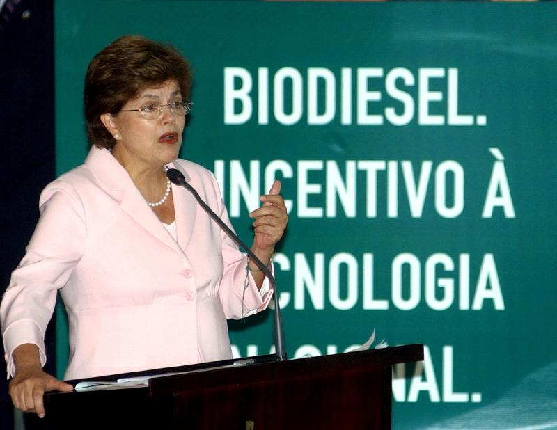 Ministra de Minas e Energia, Dilma Roussef, discursa durante cerimônia de lançamento do Programa Nacional de Biodiesel, no Palácio do Planalto.